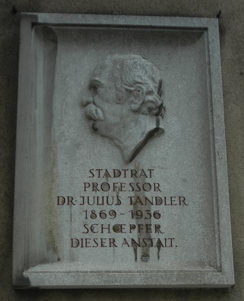 Kinderübernahmestelle in Wien-Alsergrund, Ayrenhoffgasse 9 - Gedenktafel für den Gründer Julius Tandler, enthüllt am 26. August 1946 [1]